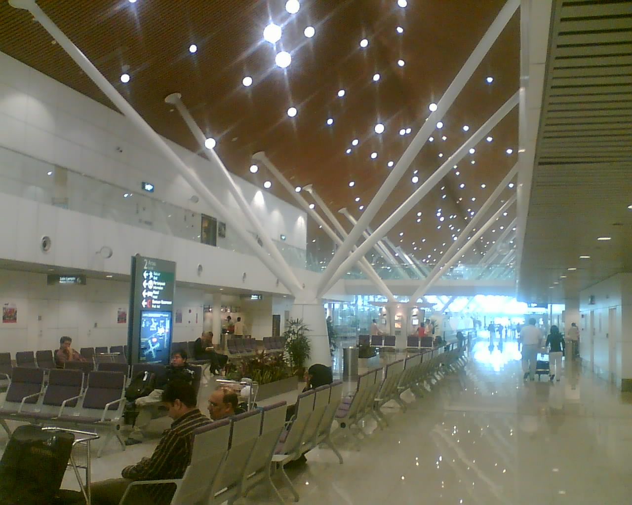 Passenger level, Satellite Building, KLIA. Taken by Wkong.